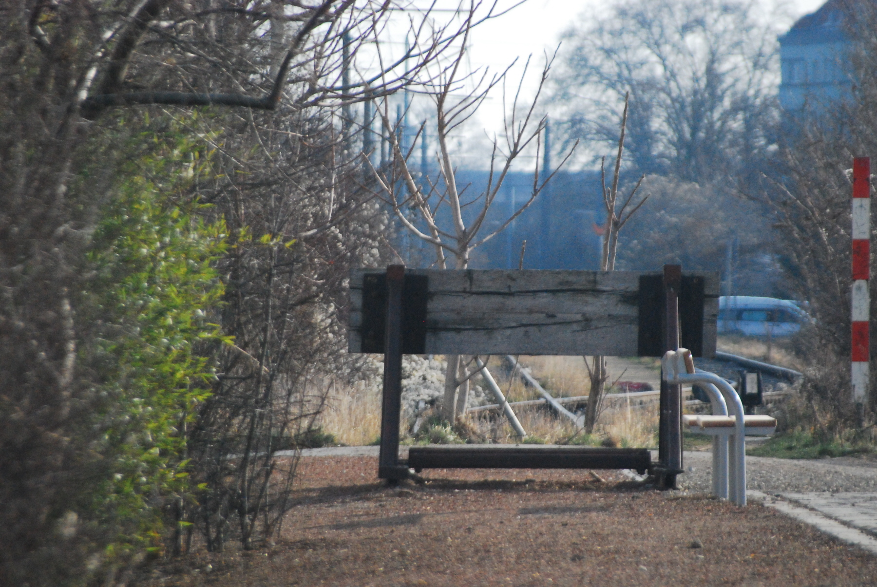 derzeitiges (Jänner 2012) Ende der Schlachthausbahn an der Grenze von Simmering und Landstraße in Wien